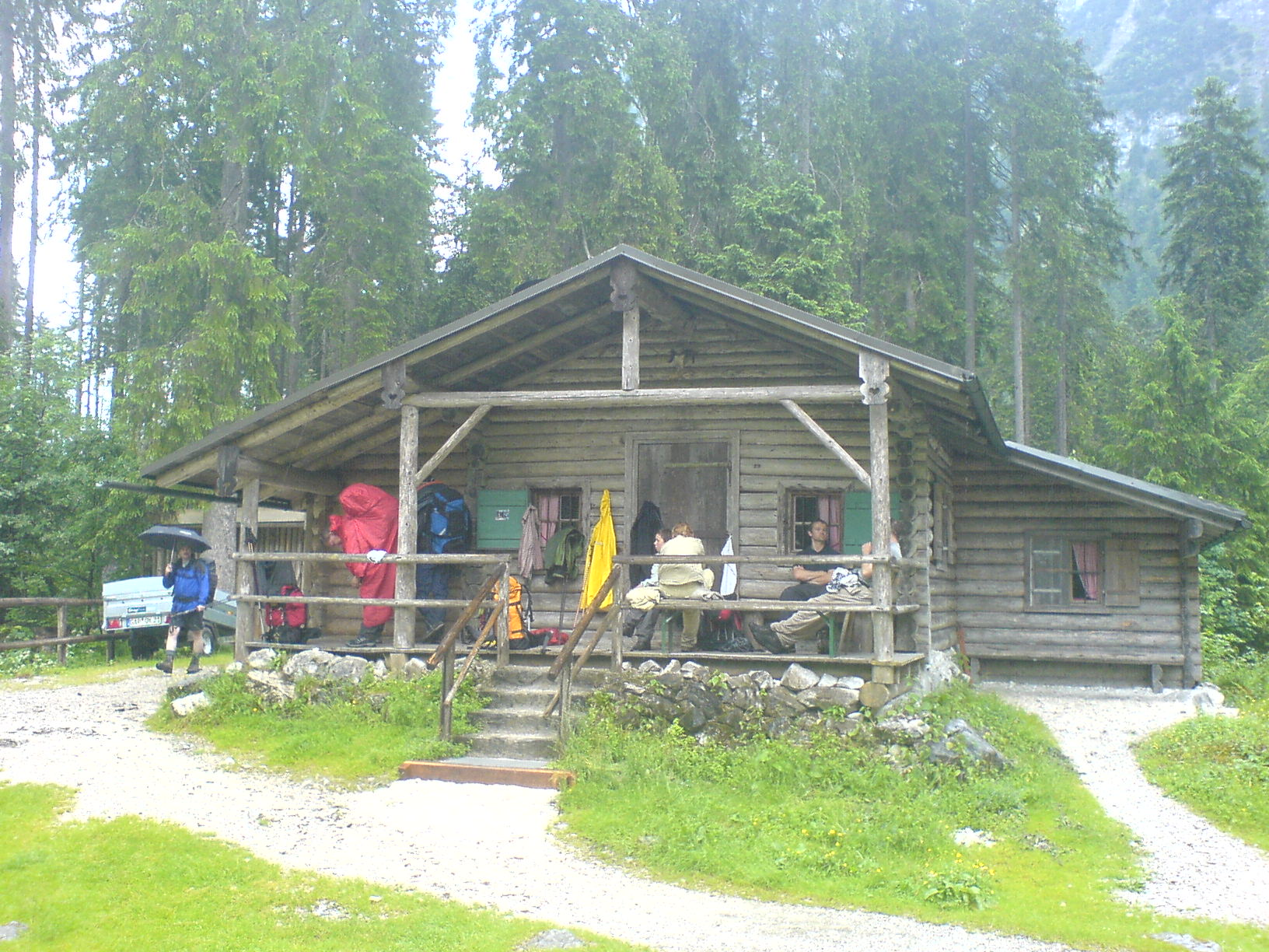 Bockhütte